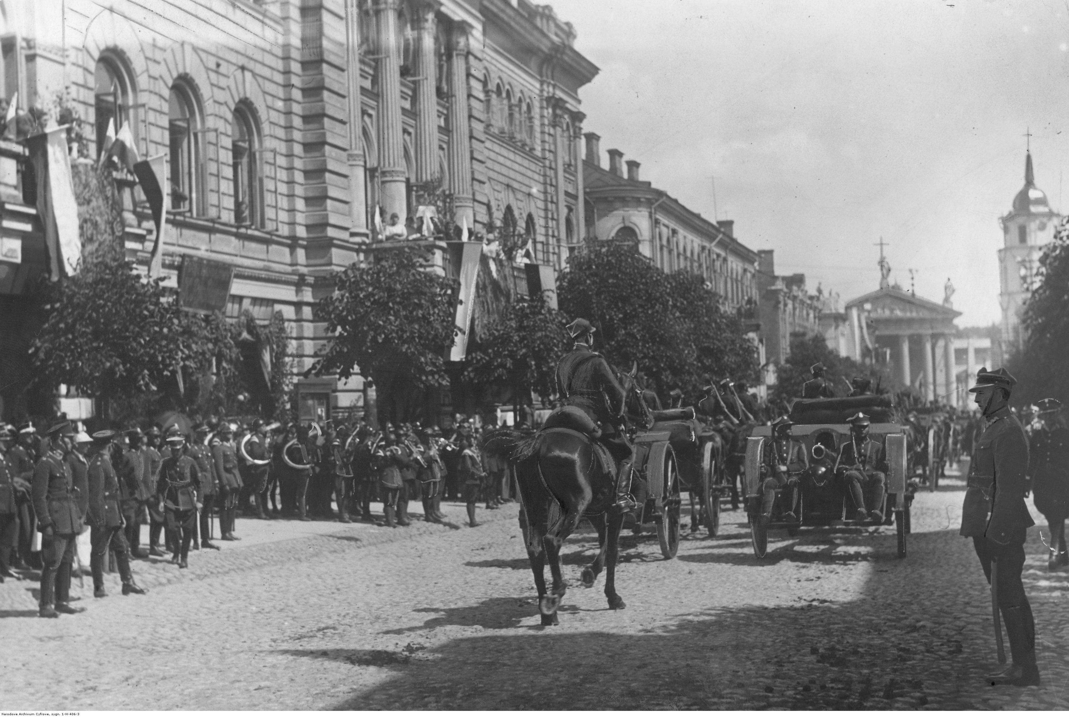 Uroczystości z okazji przyłączenia Wileńszczyzny do Polski 18 kwietnia 1922. Defilada wojskowa na ulicach Wilna. Widoczne haubice Škoda 100 mm vz. 14/19 z obsługą. Koncern Ilustrowany Kurier Codzienny - Archiwum Ilustracji. Sygnatura: 1-H-406-3